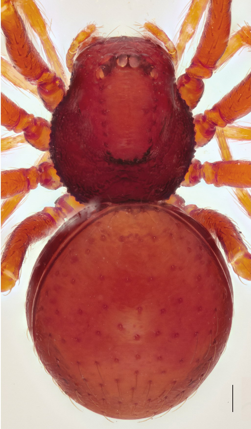 Brignoliella patmae